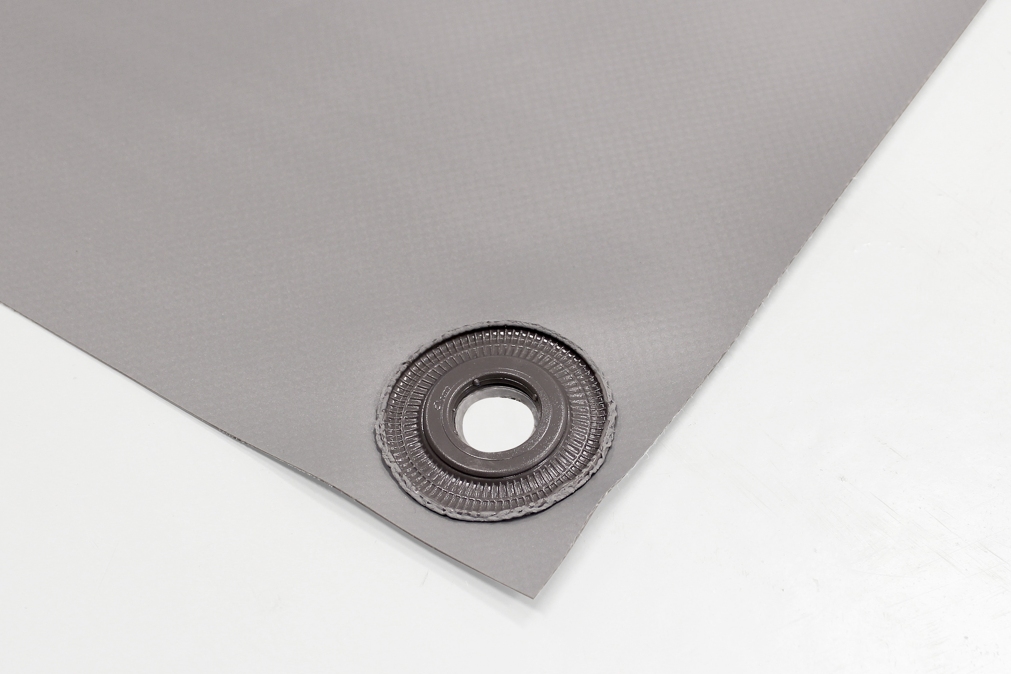 Öljett svetsad med högfrekvens-svets utan värme. Öljetten smälter och blir en del av duken.